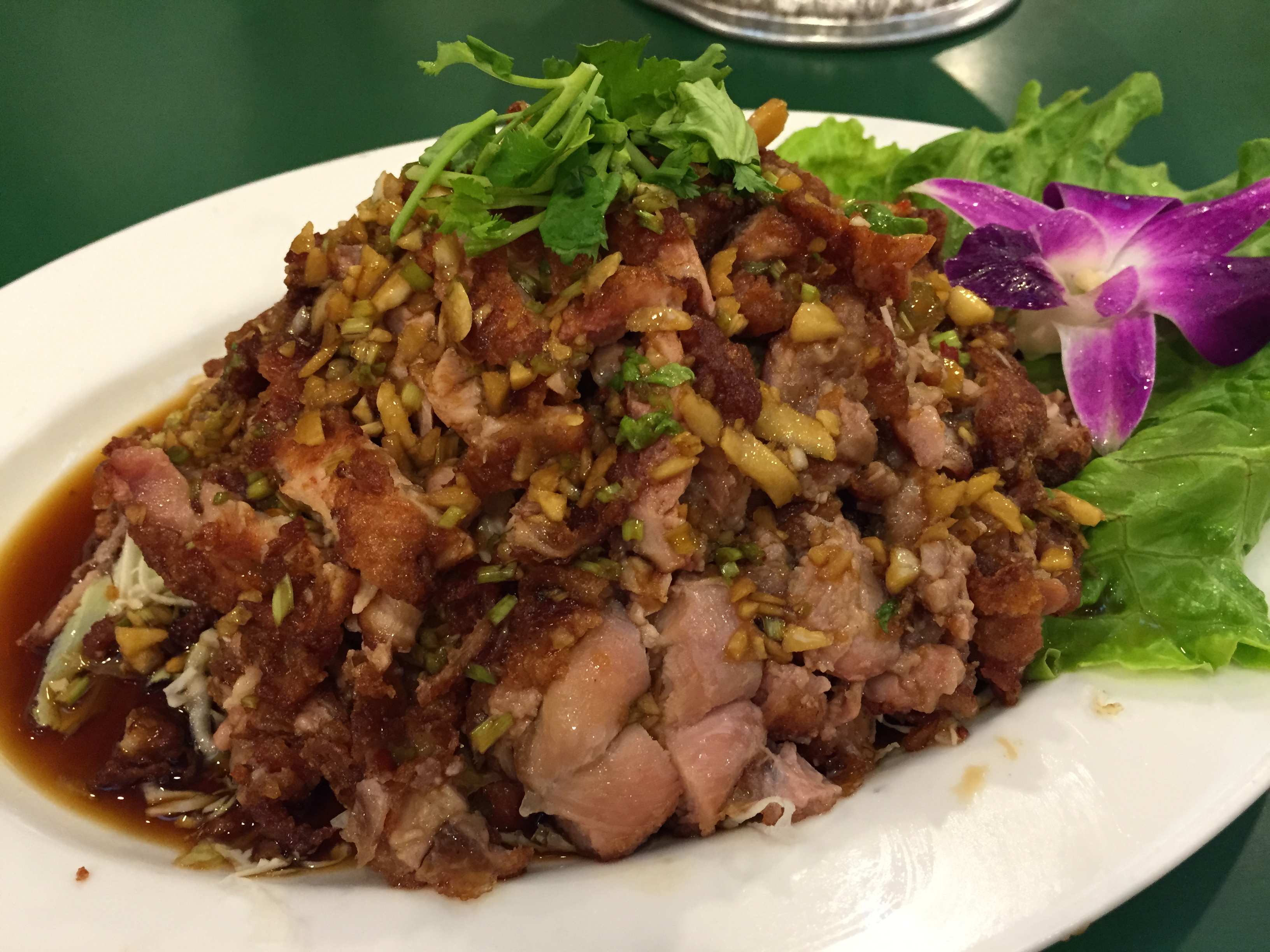 椒麻雞, 泰鄉雲餐廳, 台北